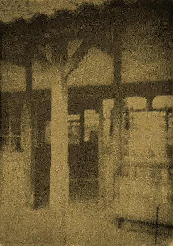 旧野田町驛・旧北総鐡道